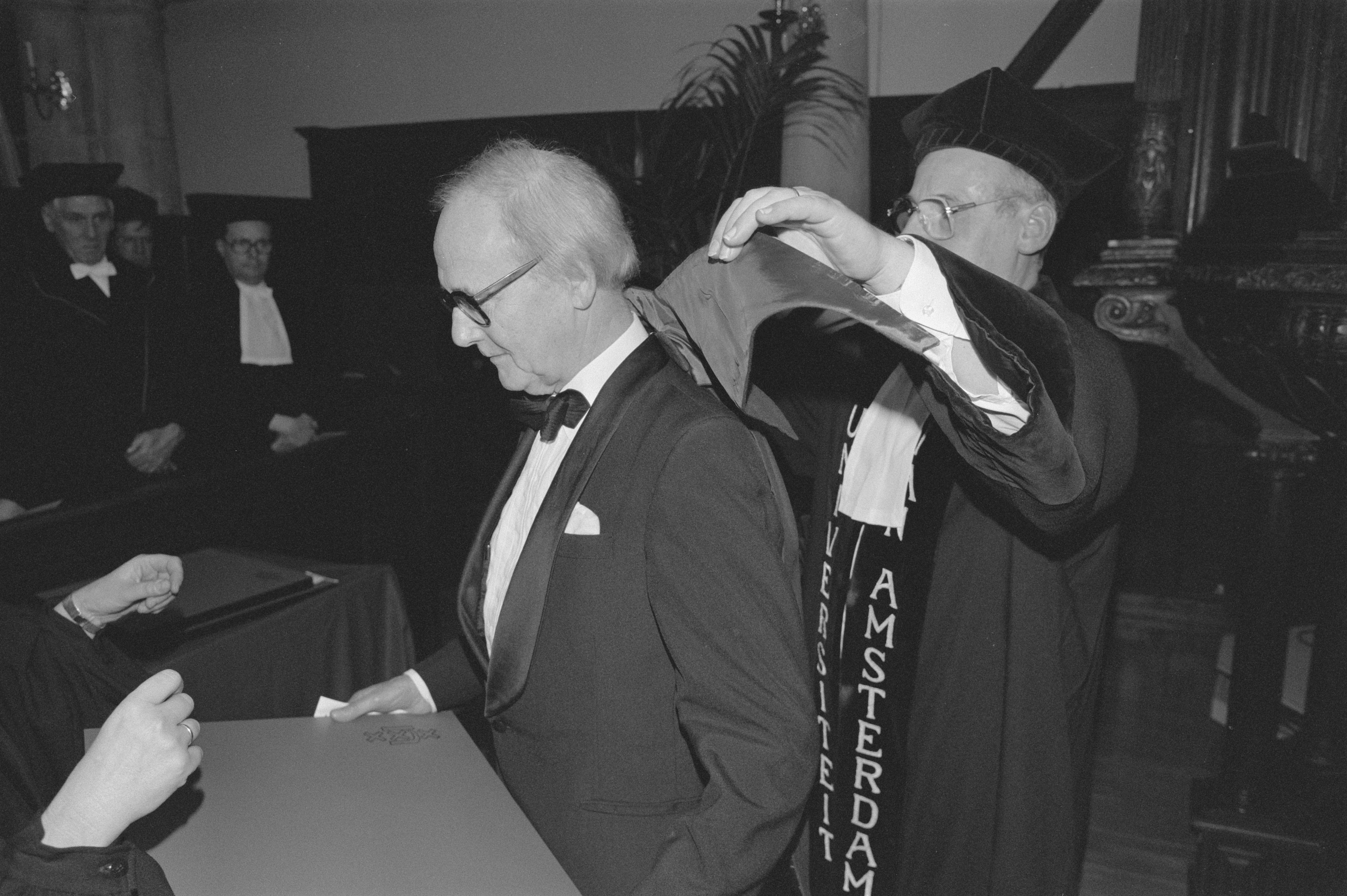 Collectie / Archief : Fotocollectie Anefo Reportage / Serie : [ onbekend ] Beschrijving : Eredoctoraten UvA; nr. 21, 22: Charles B. Timmer , nr. 1 20: prof. J. Frank Kermode Datum : 8 januari 1988 Trefwoorden : uitreikingen Persoonsnaam : Charles B. Timmer, prof. J. Frank Kermode Fotograaf : Molendijk, Bart / Anefo Auteursrechthebbende : Nationaal Archief Materiaalsoort : Negatief (zwart/wit) Nummer archiefinventaris : bekijk toegang 2.24.01.05 Bestanddeelnummer : 934-1653